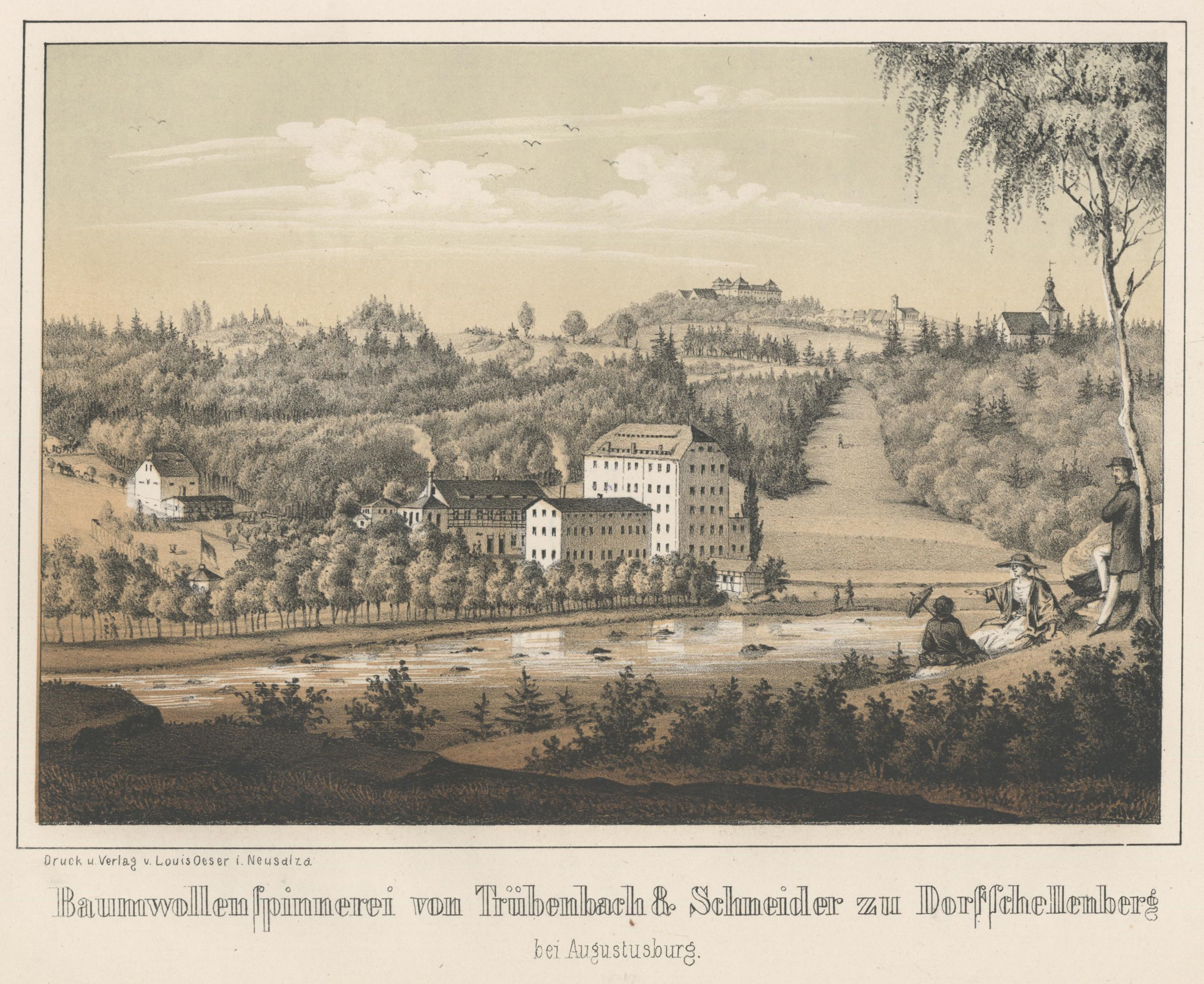 Baumwollenspinnerei von Trübenbach & Schneider zu Dorfschellenberg bei Augustusburg aus: Album der Sächsischen Industrie Erster Band